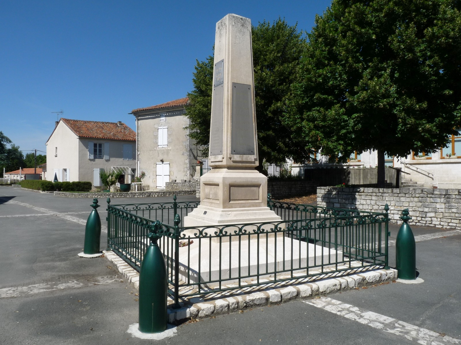 Monument aux morts, Agris, Charente, France